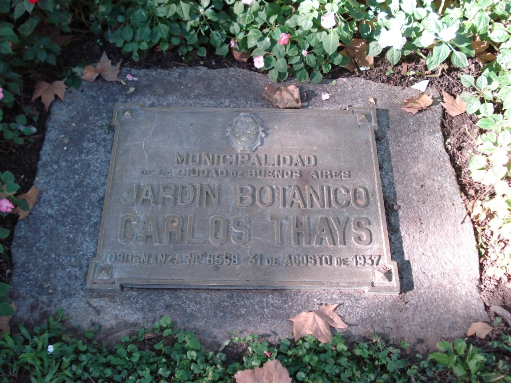 Placa en el jardín botánico Carlos Thays de la Ciudad Autónoma de Buenos Aires, Argentina.